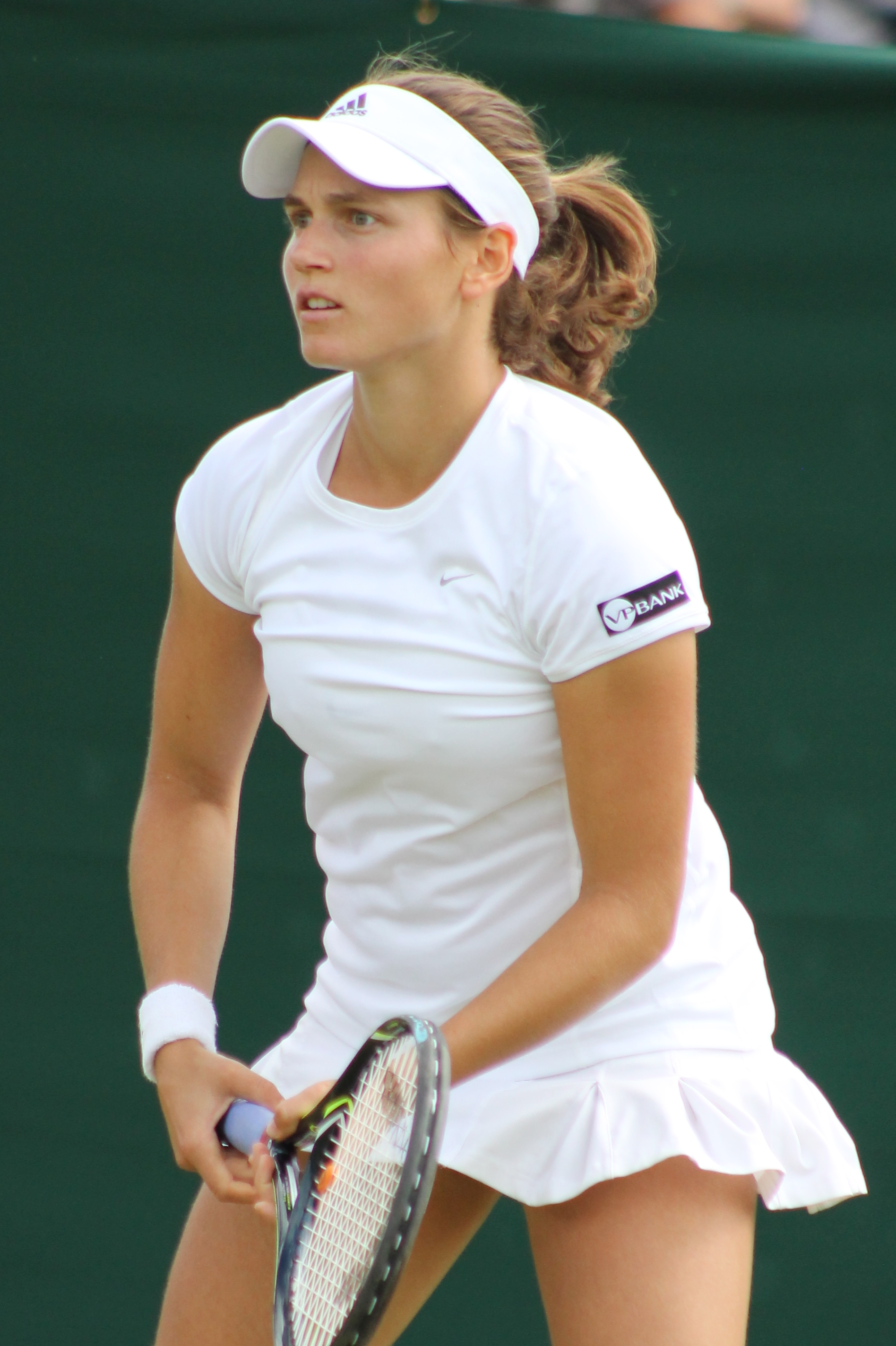 Vogt WMQ15 (1)